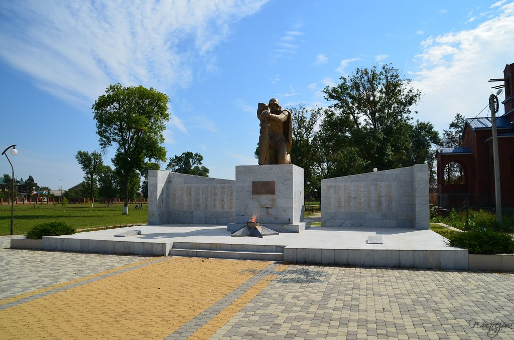 Памятник возле которого все жители посёлка собираются на 9 мая, и делают памятные фото в день свадьбы